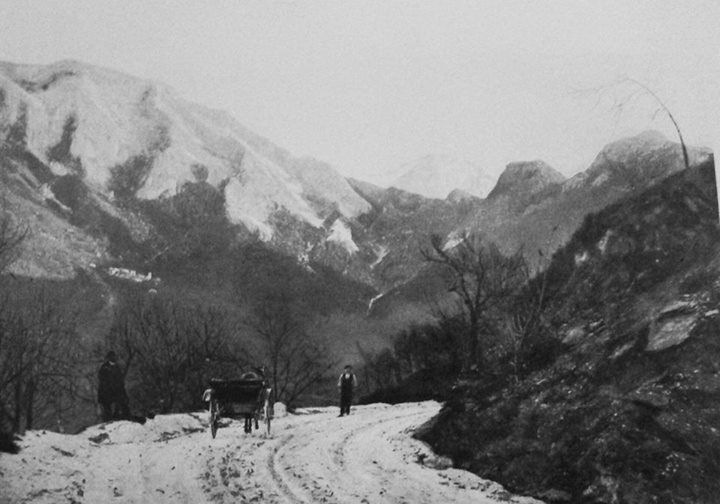 Fotografia di fine Ottocento-primo Novecento, raffigurante un tratto di strada d'Arni in costruzione presso Retignano. Sullo sfondo si vedono il Corchia, la Pania e il paese di Levigliani